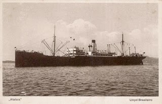 Cartão postal do Lloyd Brasileiro (Loide Brasileiro)o qual retrata o vapor Atalaia, desaparecido no Oceano Atlântico em 1941